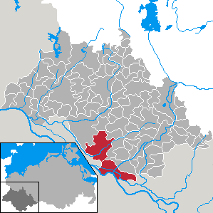 Former Amt Dömitz in Mecklenburg-Vorpommern - district Ludwigslust